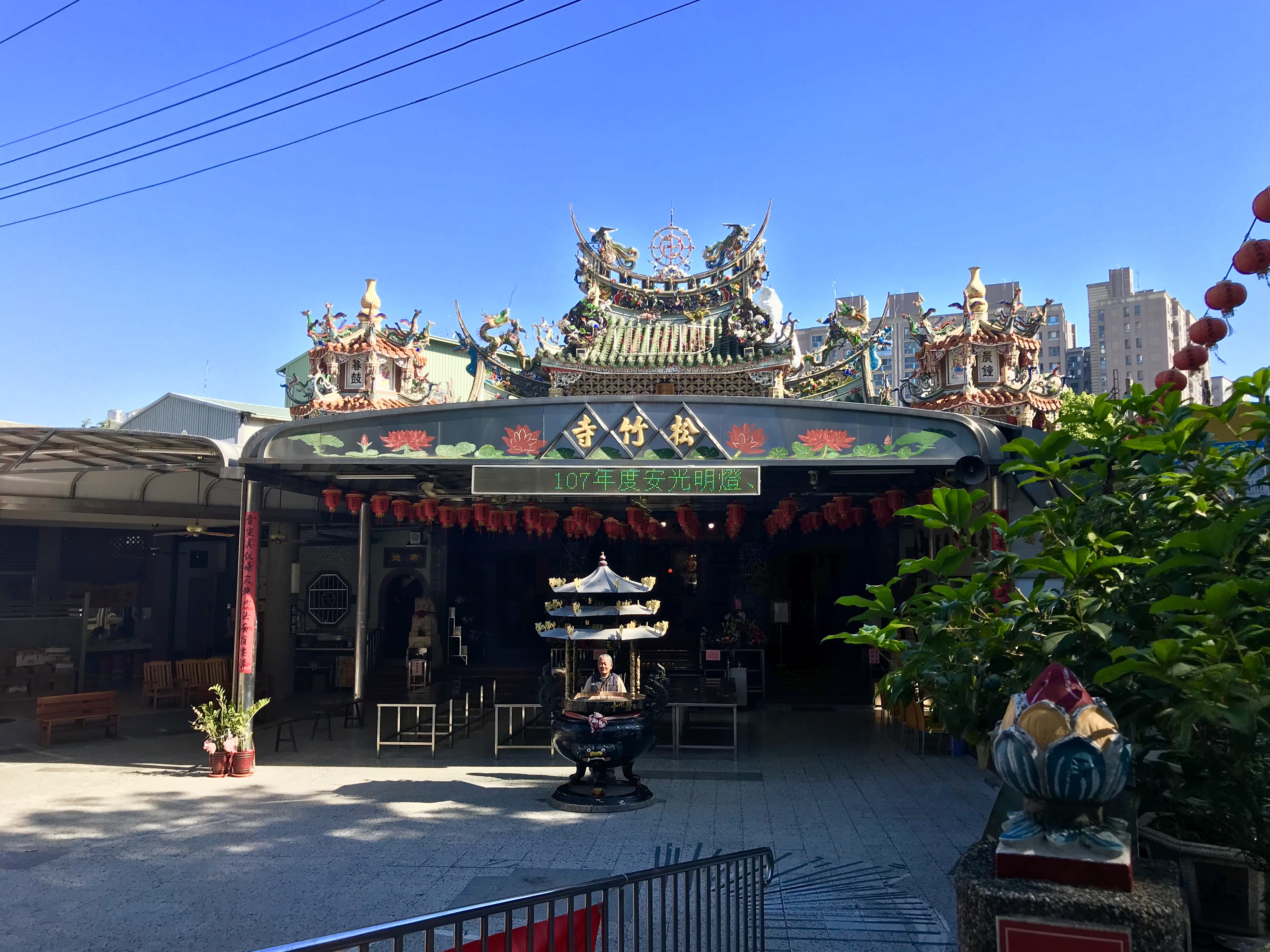 中文（台灣）: 松竹寺一景